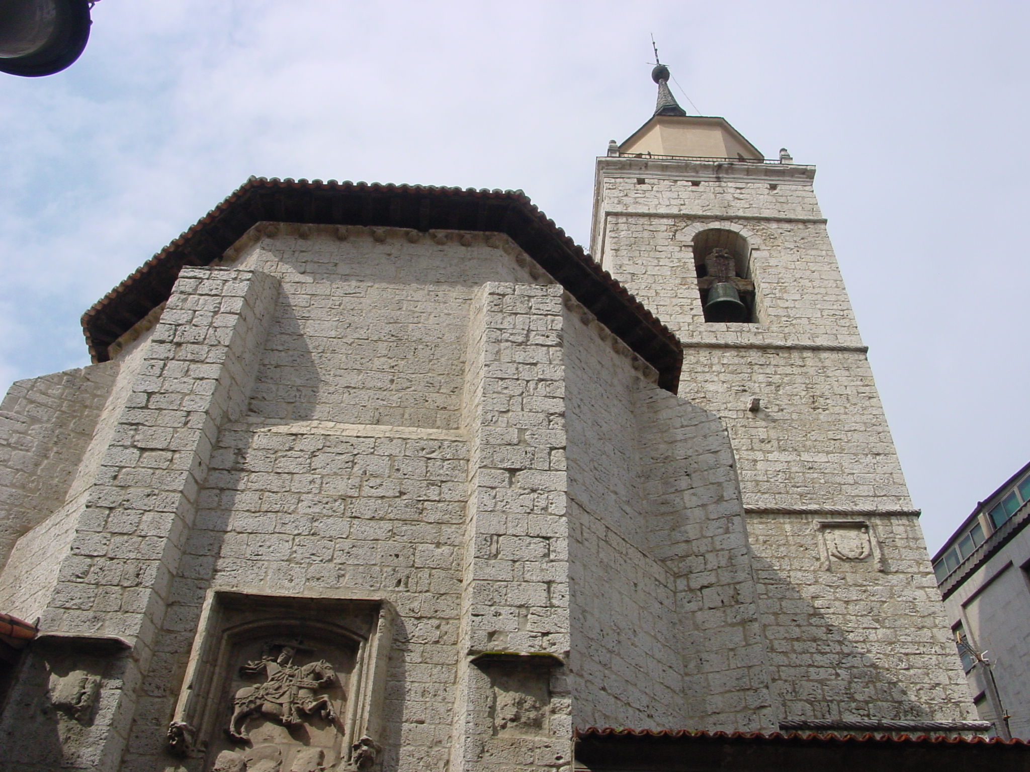 Valladolid, ábside de la iglesia de Santiago y torre. Valladolid, apse and tower of Santiago church.